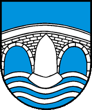 Wappen von Rüti Kanton Glarus Schweiz